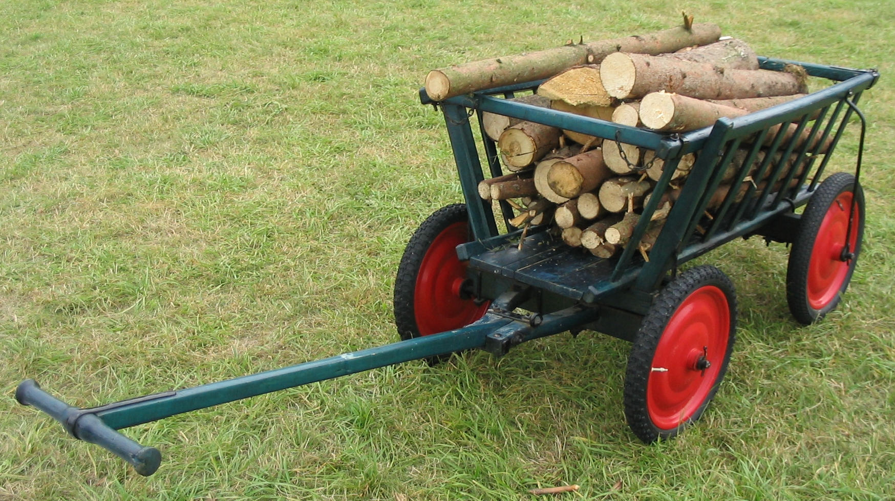 ein Bollerwagen